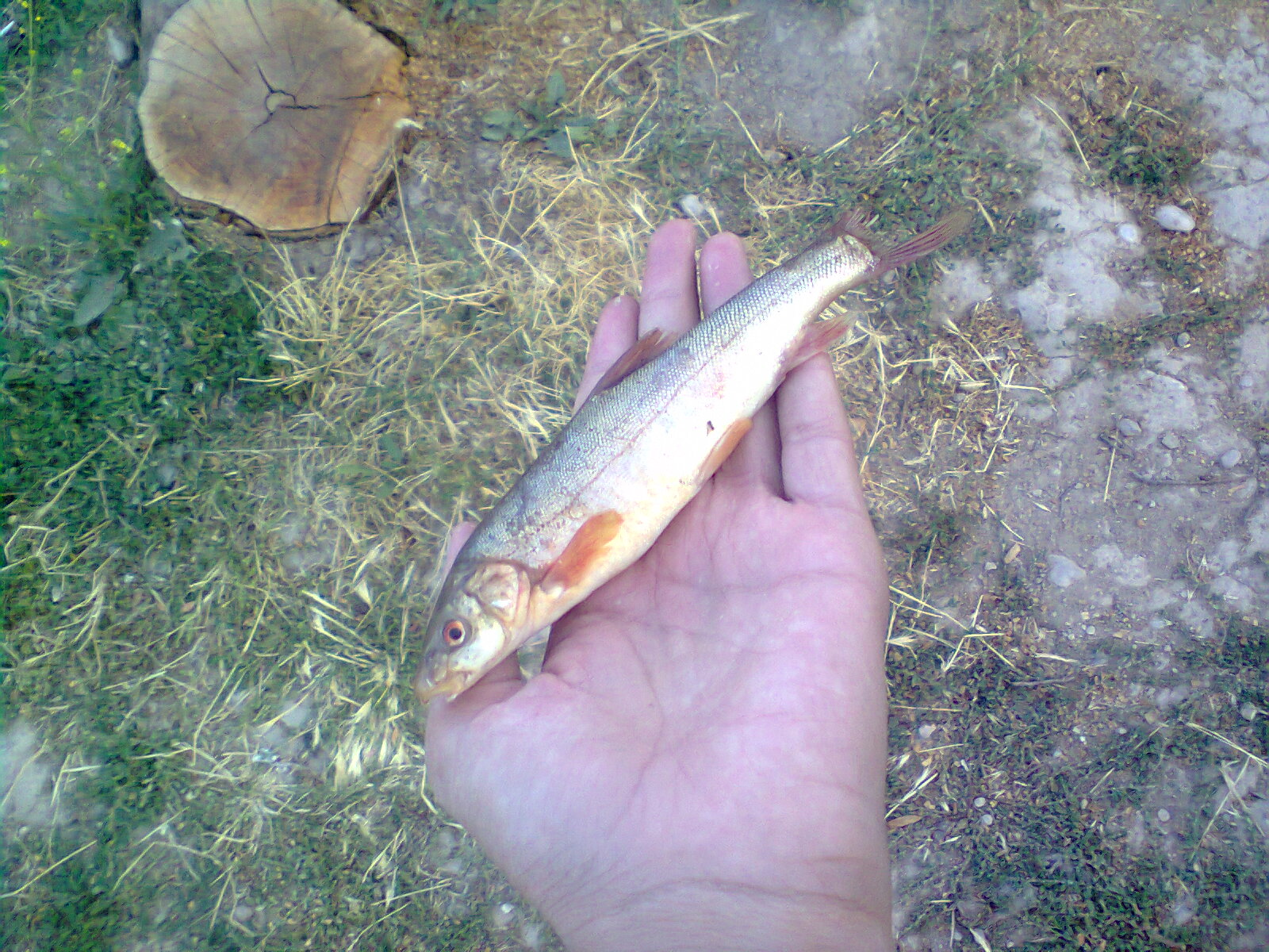 Badam river